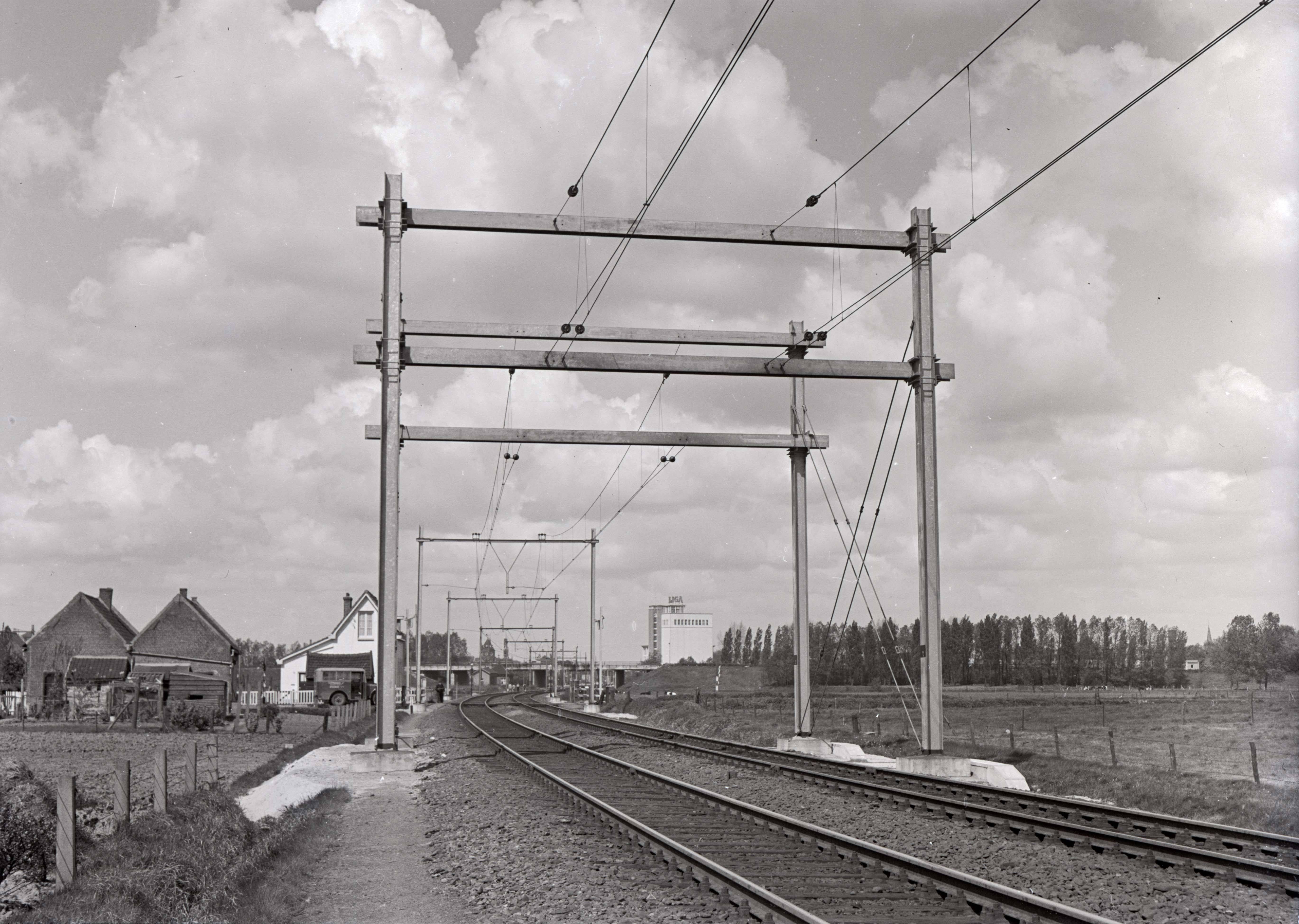 Afbeelding van de sluis in de bovenleiding op de grens tussen Nederland en België in de spoorlijn Roosendaal - Essen, voor de overgang van de Nederlandse spanning van 1500 volt naar de Belgische spanning van 3000 volt en vice versa.